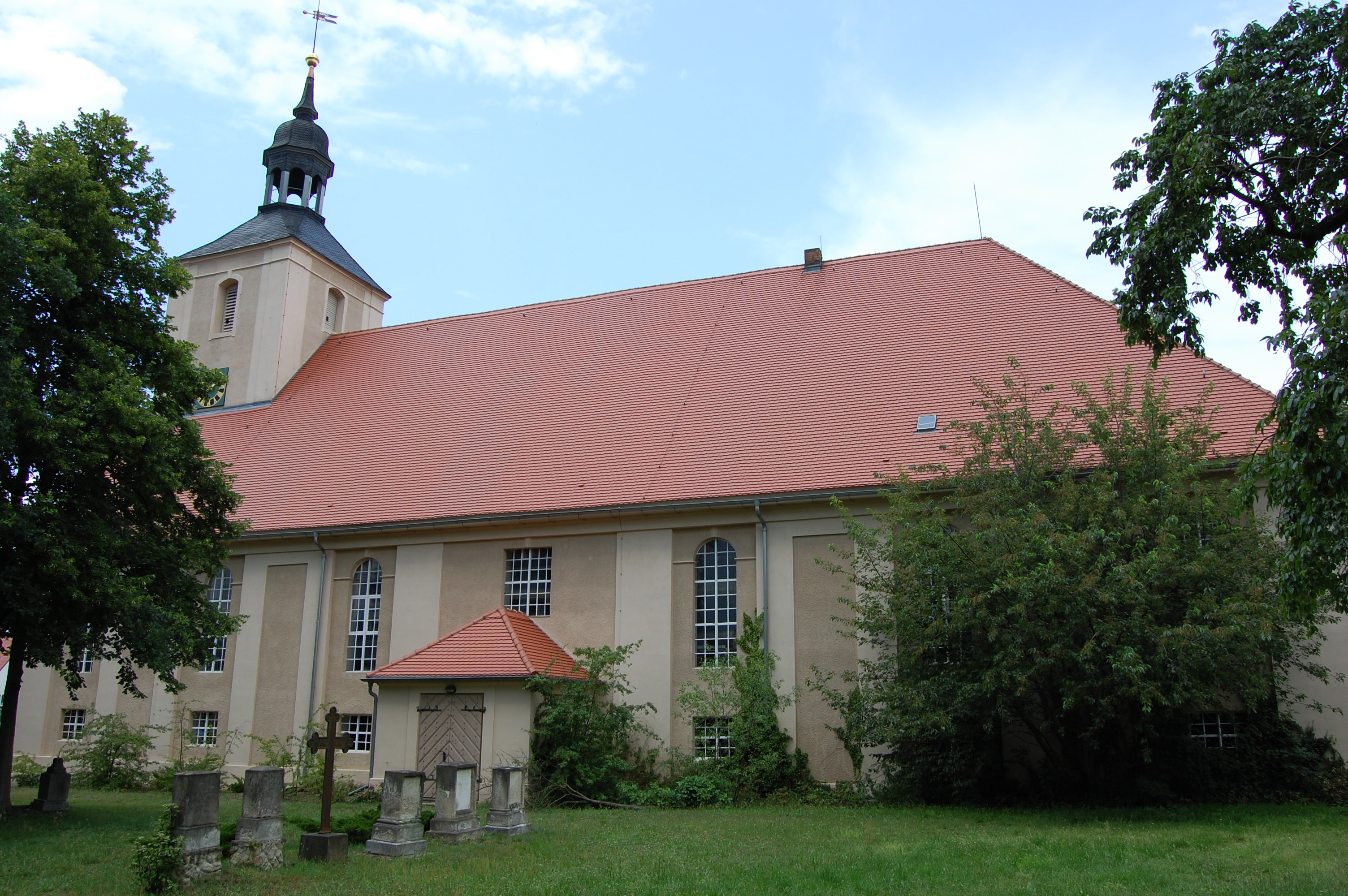 Pfarrkirche Burg, Südseite